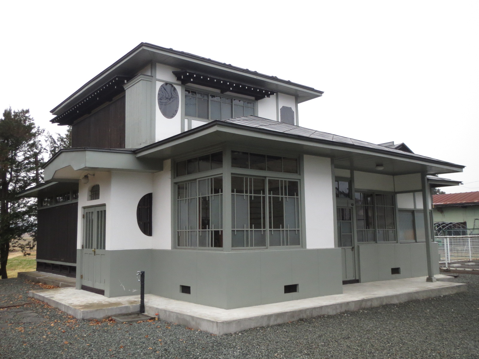 千田正記念館にある旧千田正住宅主屋 Canon IXY 3